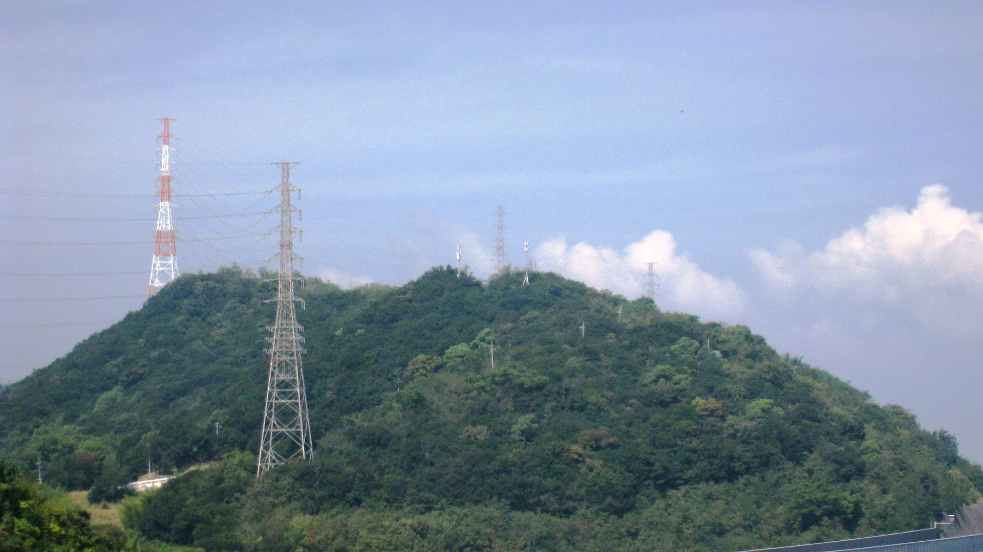 香川県坂出市と宇多津町の境にある聖通寺山を南側の角山から撮影。右奥が北側の峰、左手前が南側の峰。南側の峰の山頂に位置するのは坂出西テレビジョン中継局。